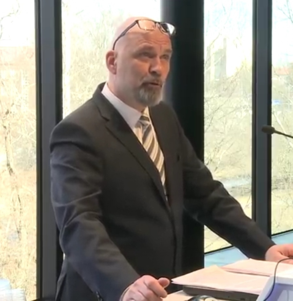 Mauri Peltokangas